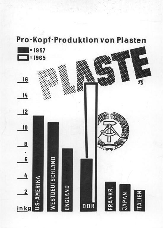 Zentralbild-Stolp Sto-Qu 2792.A.-V. 13.3.1959 Plaste Der Schwerpunkt des weiteren Aufbaus der Chemischen Industrie in der DDR liegt auf dem Gebiet der Kunststoffe und der vollsynthetischen Fasern. Die Pro-Kopf-Produktion soll bis 1965 auf 16 kg gesteigert werden. Im Jahr 1957 lag die DDR in der Plastproduktion mit 6,5 kg pro Kopf an vierter Stelle in der Weltproduktion nach den USA, Westdeutschland und England, jedoch vor Frankreich, Japan und Italien.